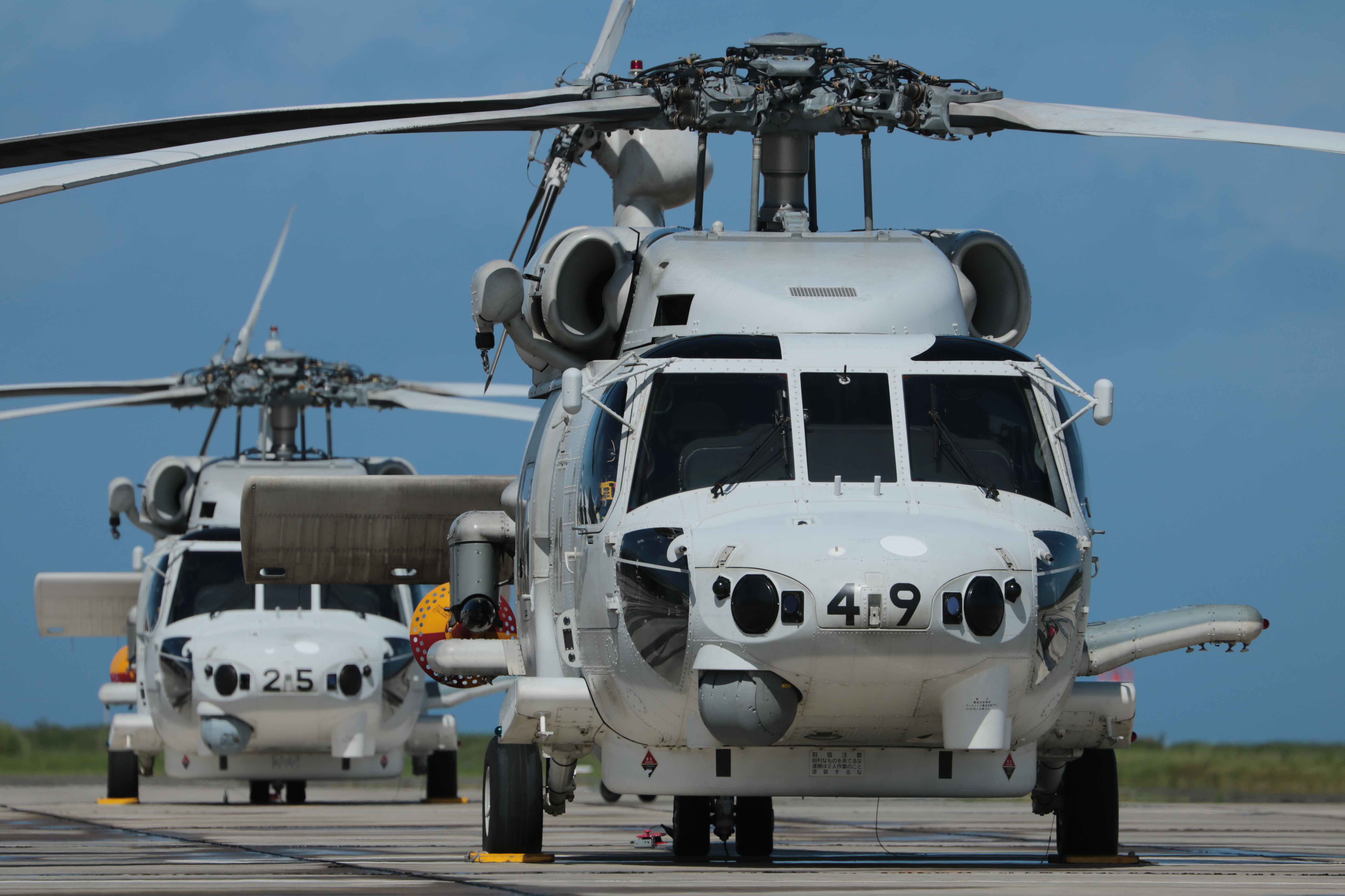 館山航空基地所属SH-60K哨戒ヘリコプター 撮影2019年7月27日